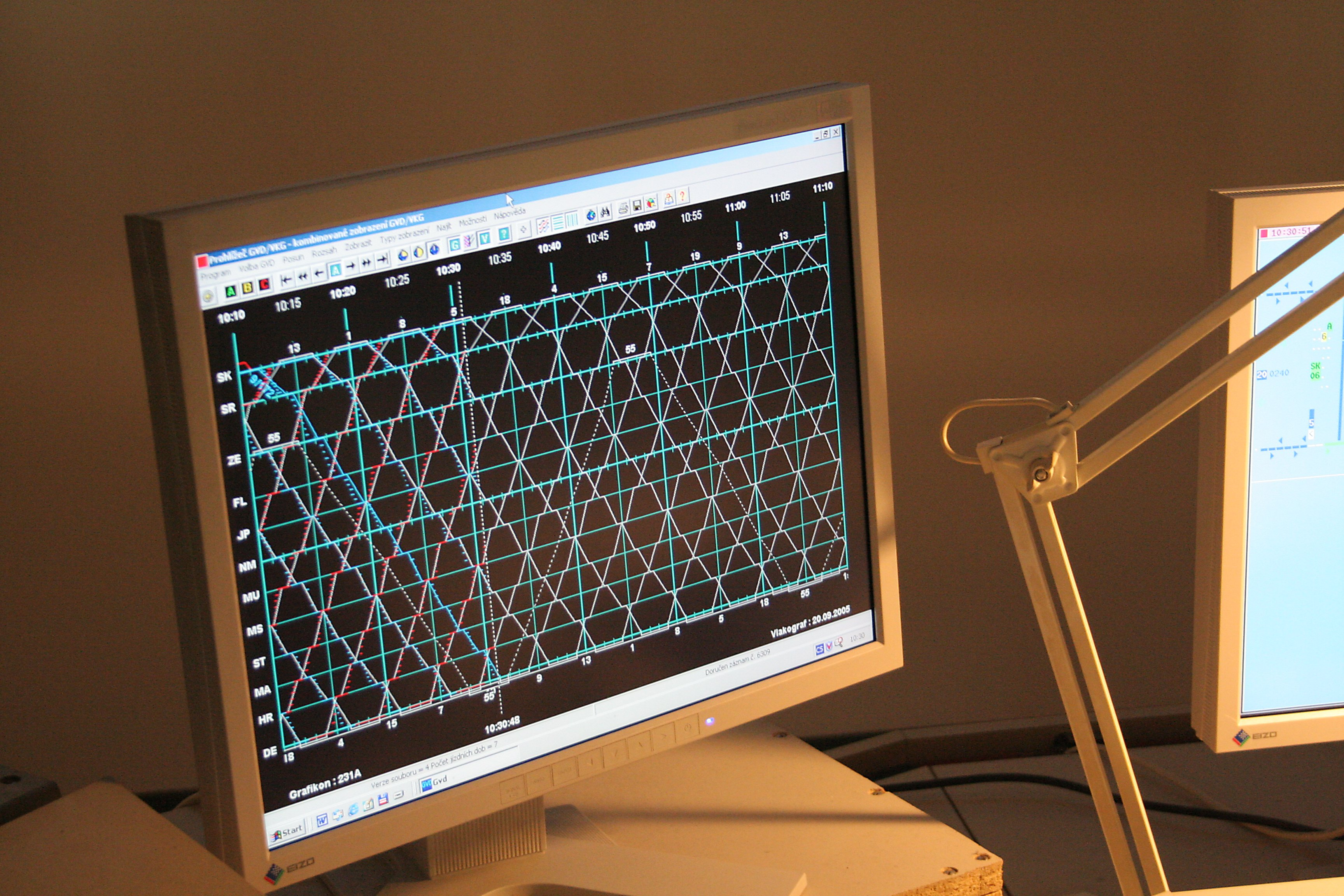 Centrální dispečink, grafikon trasy A.